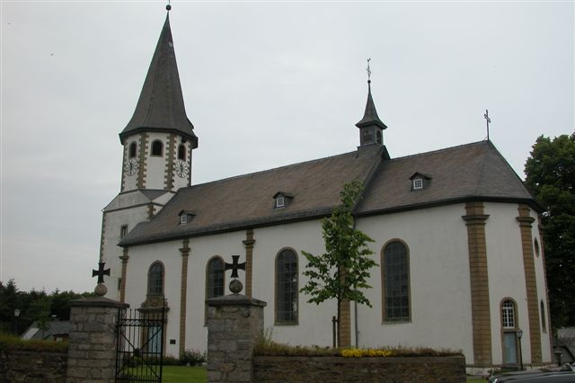 Church of Scharfenberg, Sauerland